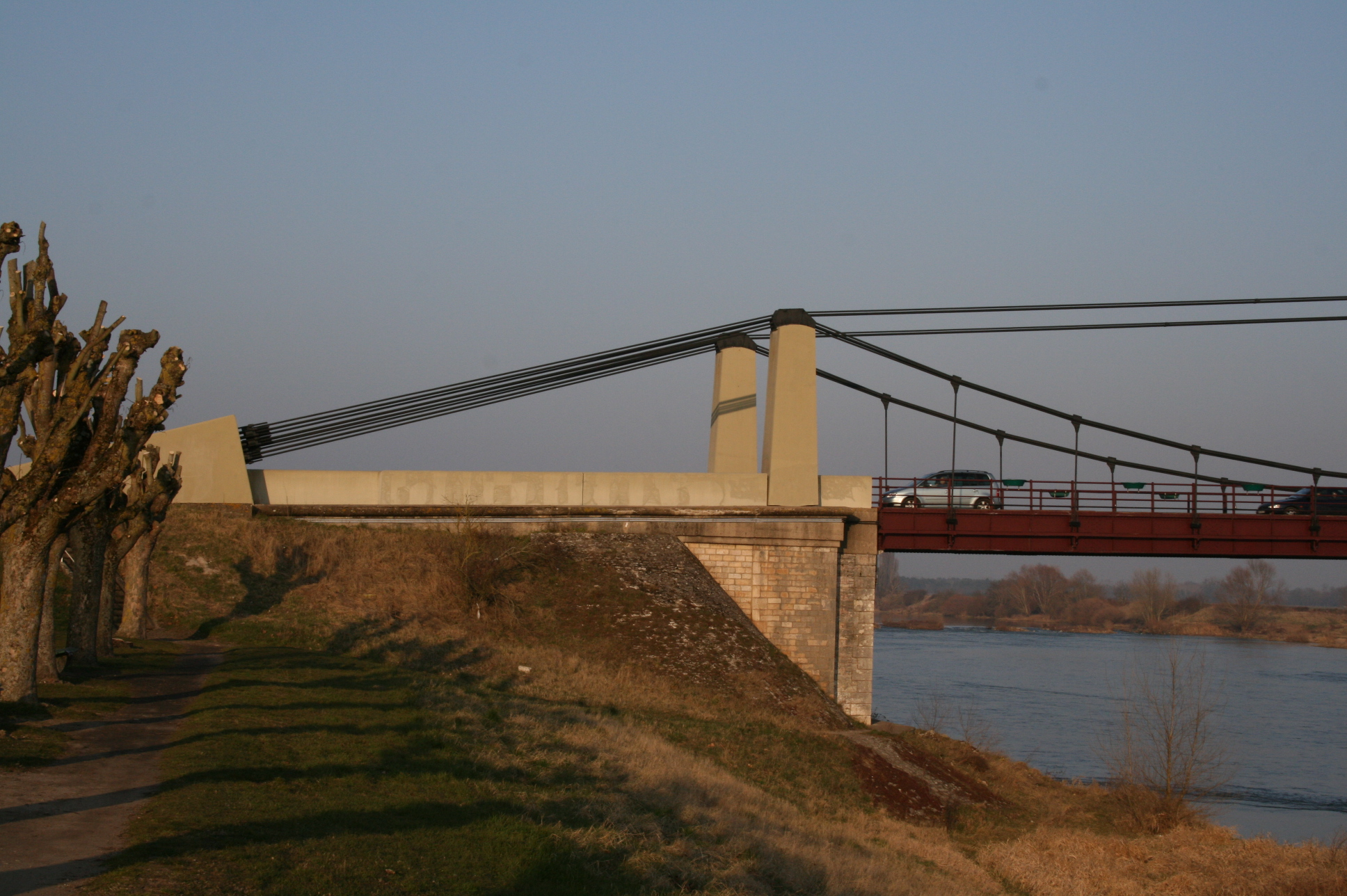 Pont de Meung-sur-Loire – Commune de Meung-sur-Loire – Département du Loiret – France – Pont suspendu